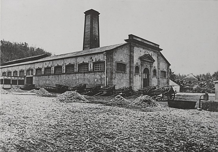 Charroi de canne à sucre déchargé devant une sucrerie — Réunion